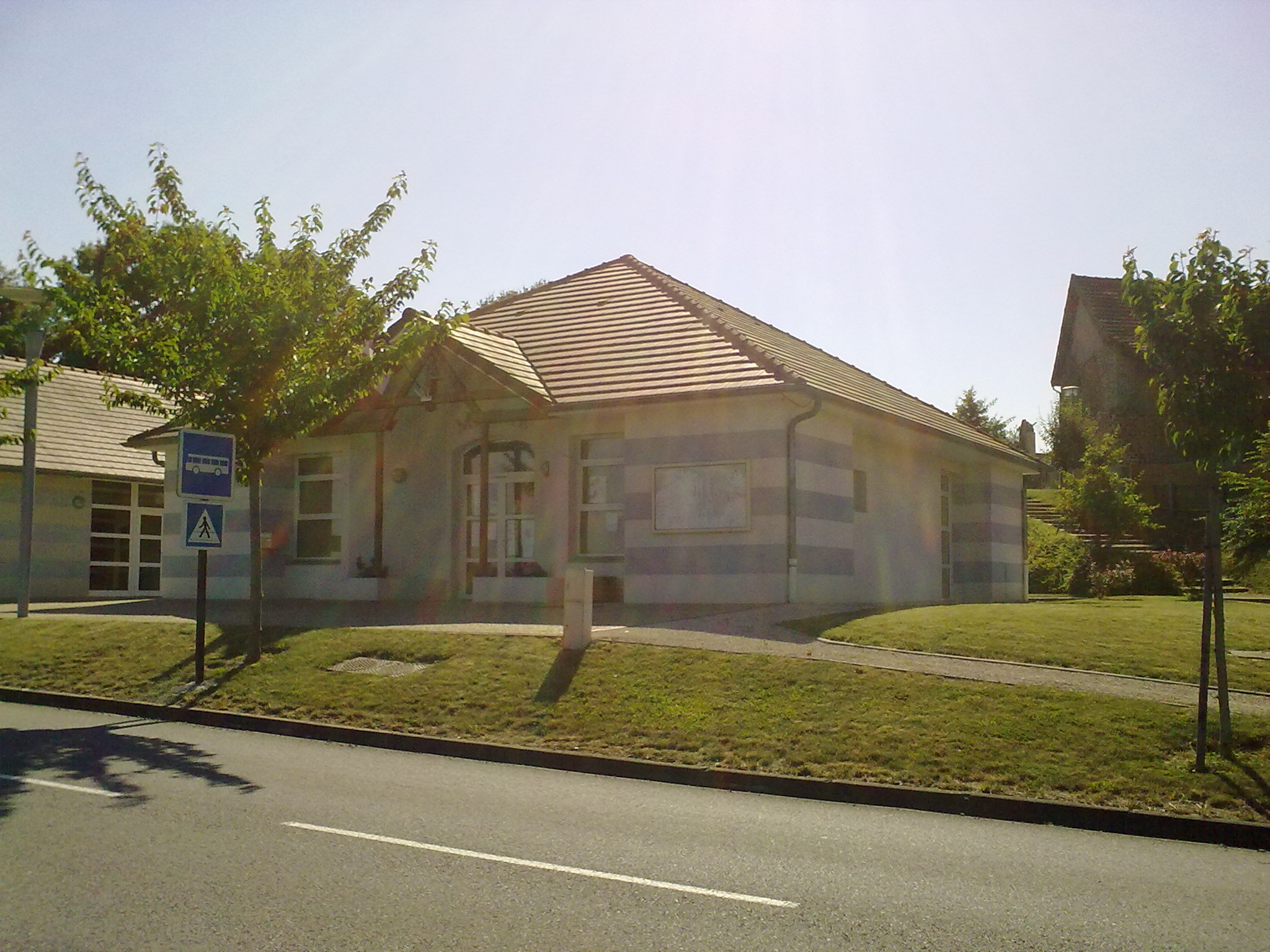 La mairie d'Anos.